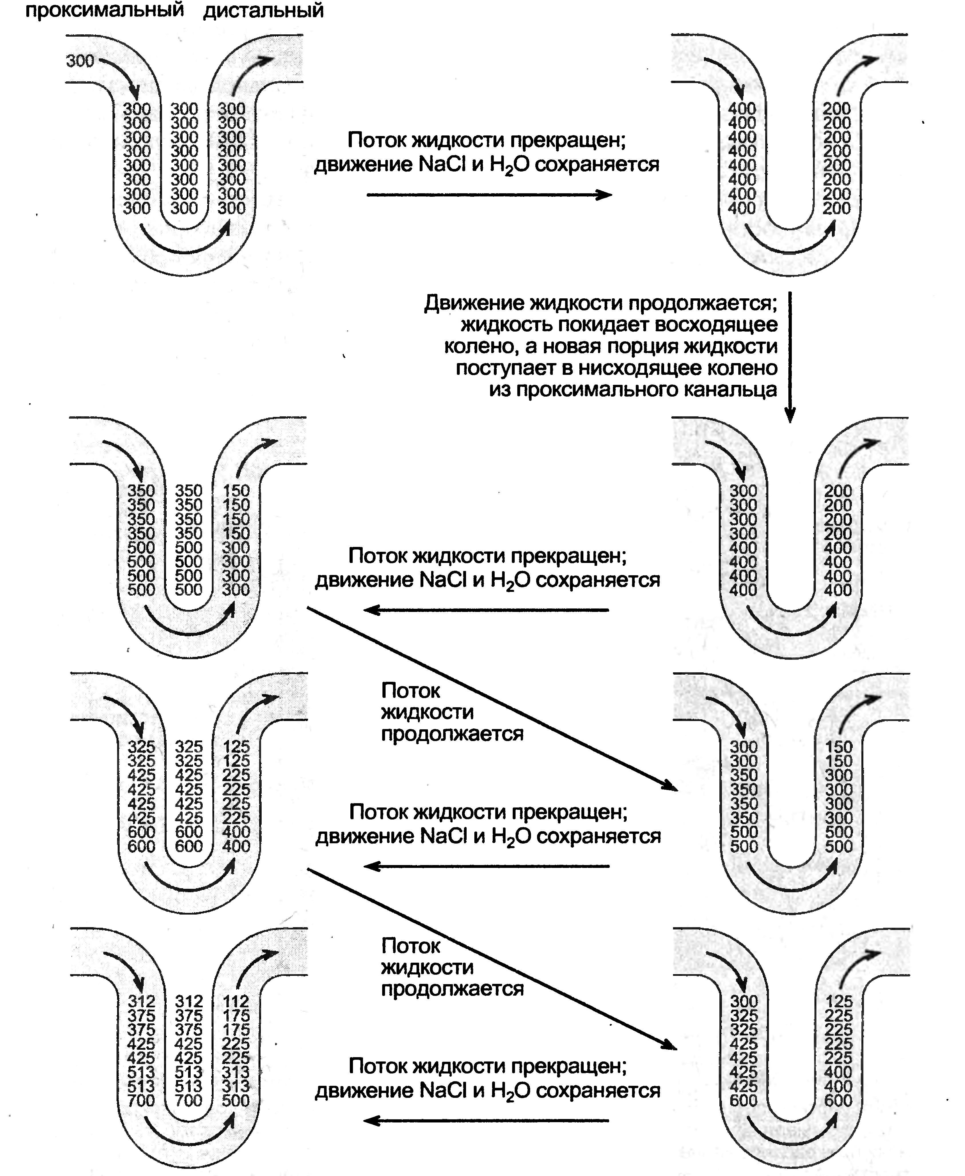 Протипоточний обиінник у петлі Генле